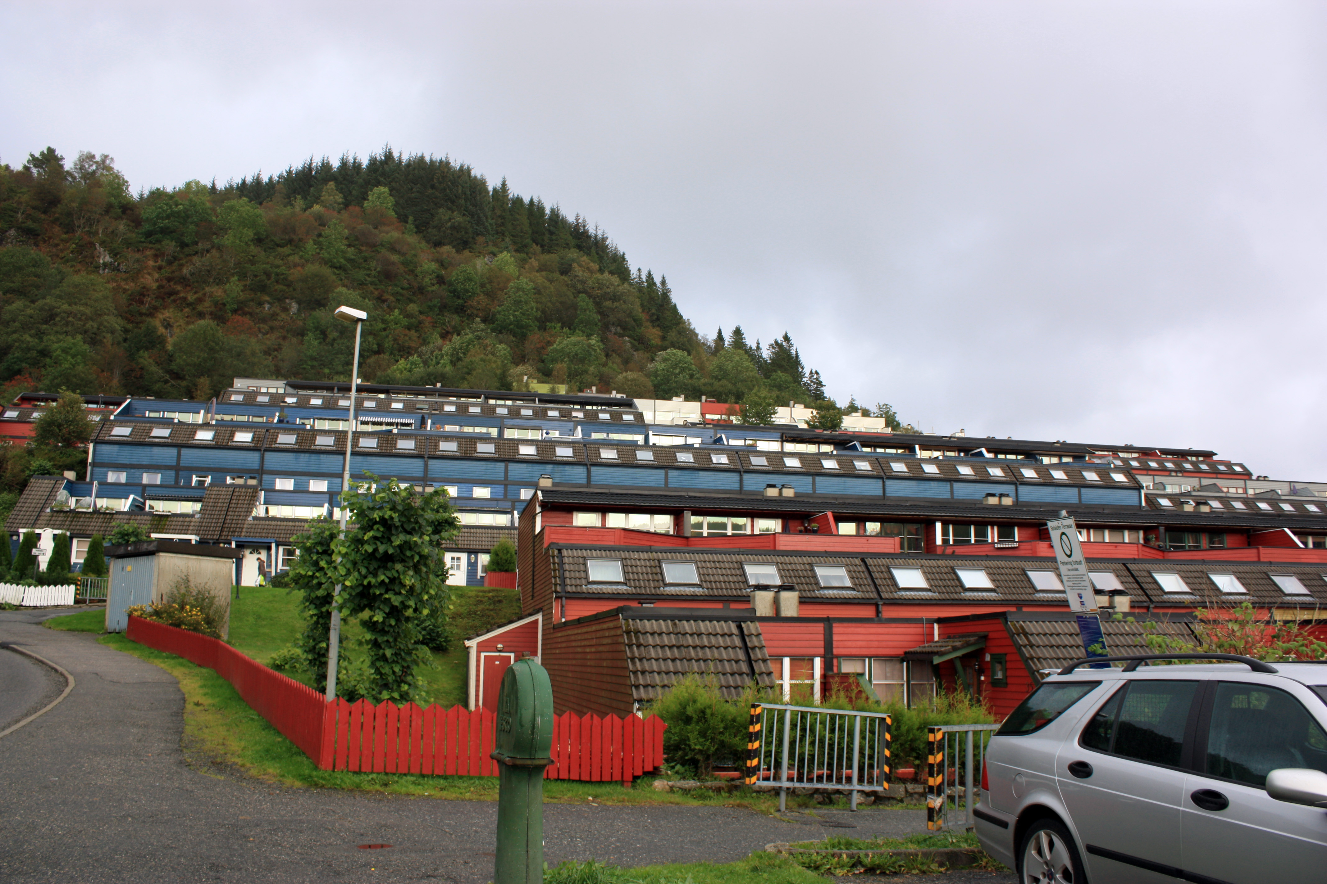 Vallalia, Fana, Bergen.